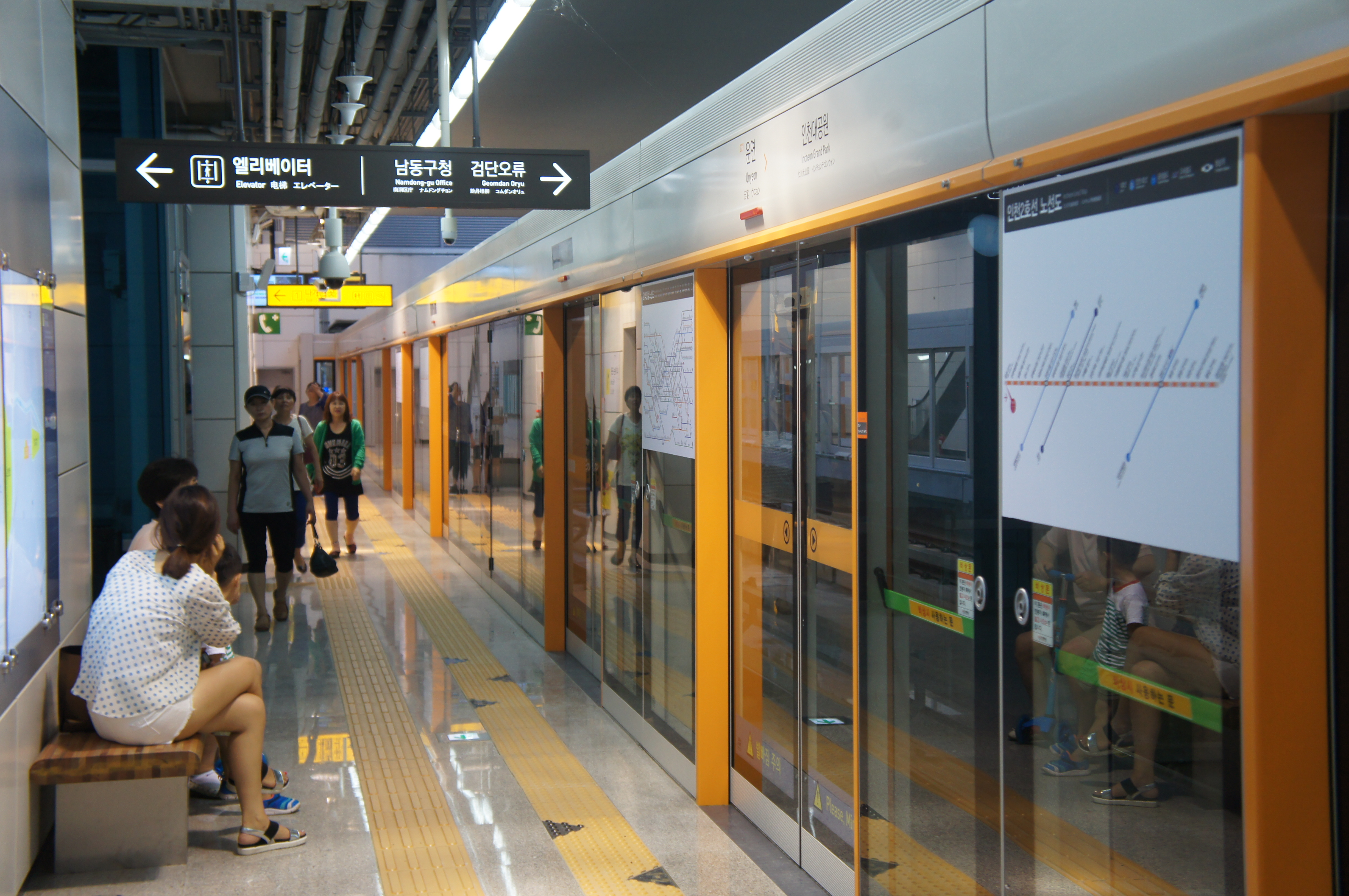 운연역 승강장